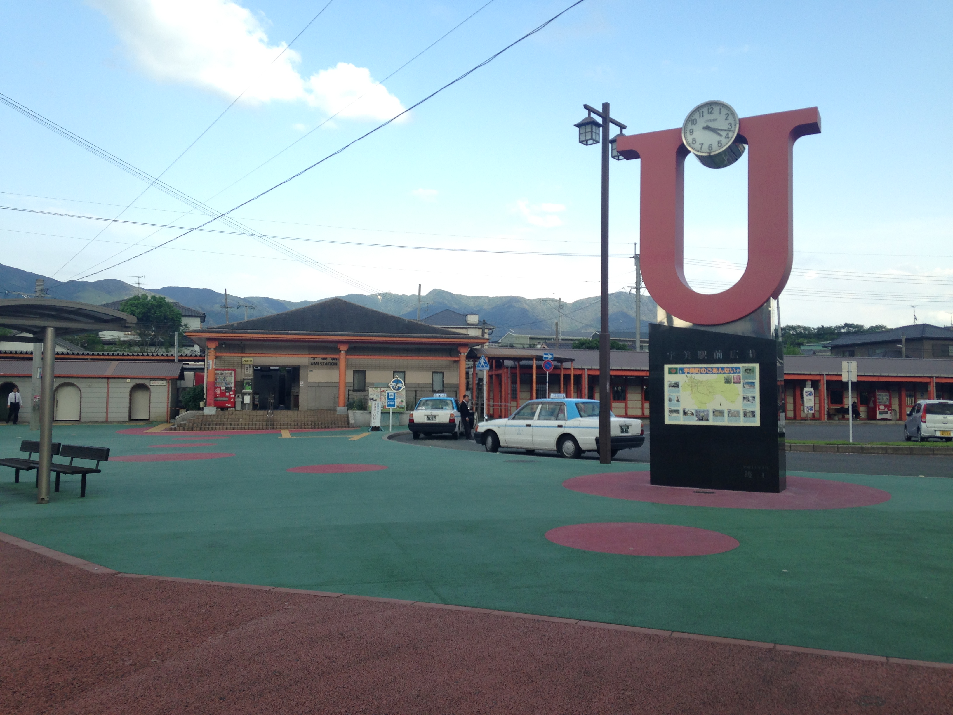 宇美駅前広場